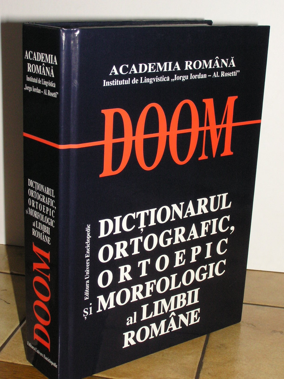 Dicţionarul ortografic, ortoepic şi morfologic al limbii române (DOOM).